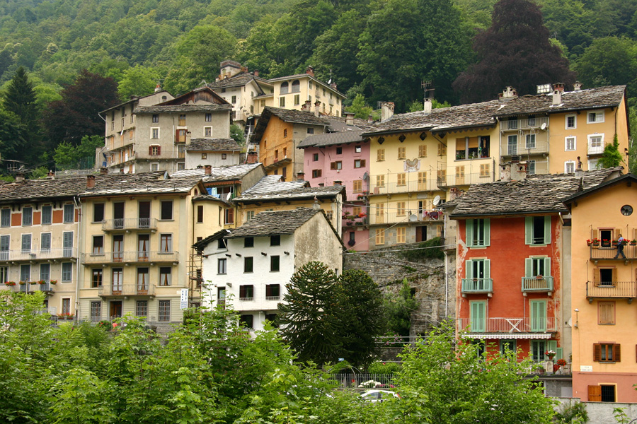 Panorama del borgo di Rosazza (BI)